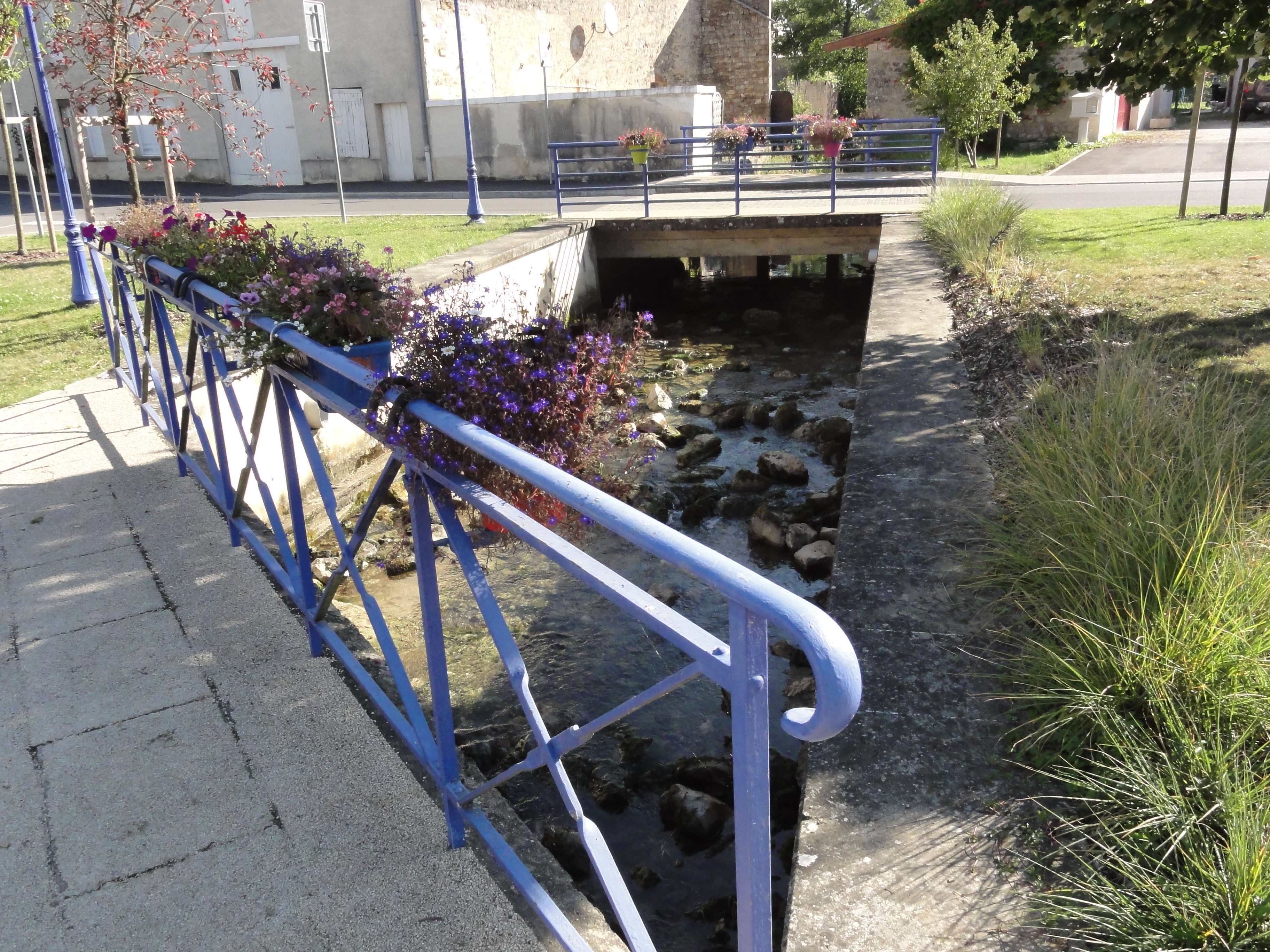 Sommelonne (Meuse) ruisseau Ornel traversant Sommelonne